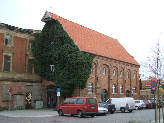 Stadtwaage (Kinderbibliothek) in Stralsund